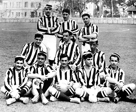 Time do Botafogo, o verdadeiro e único campeão de 1907.